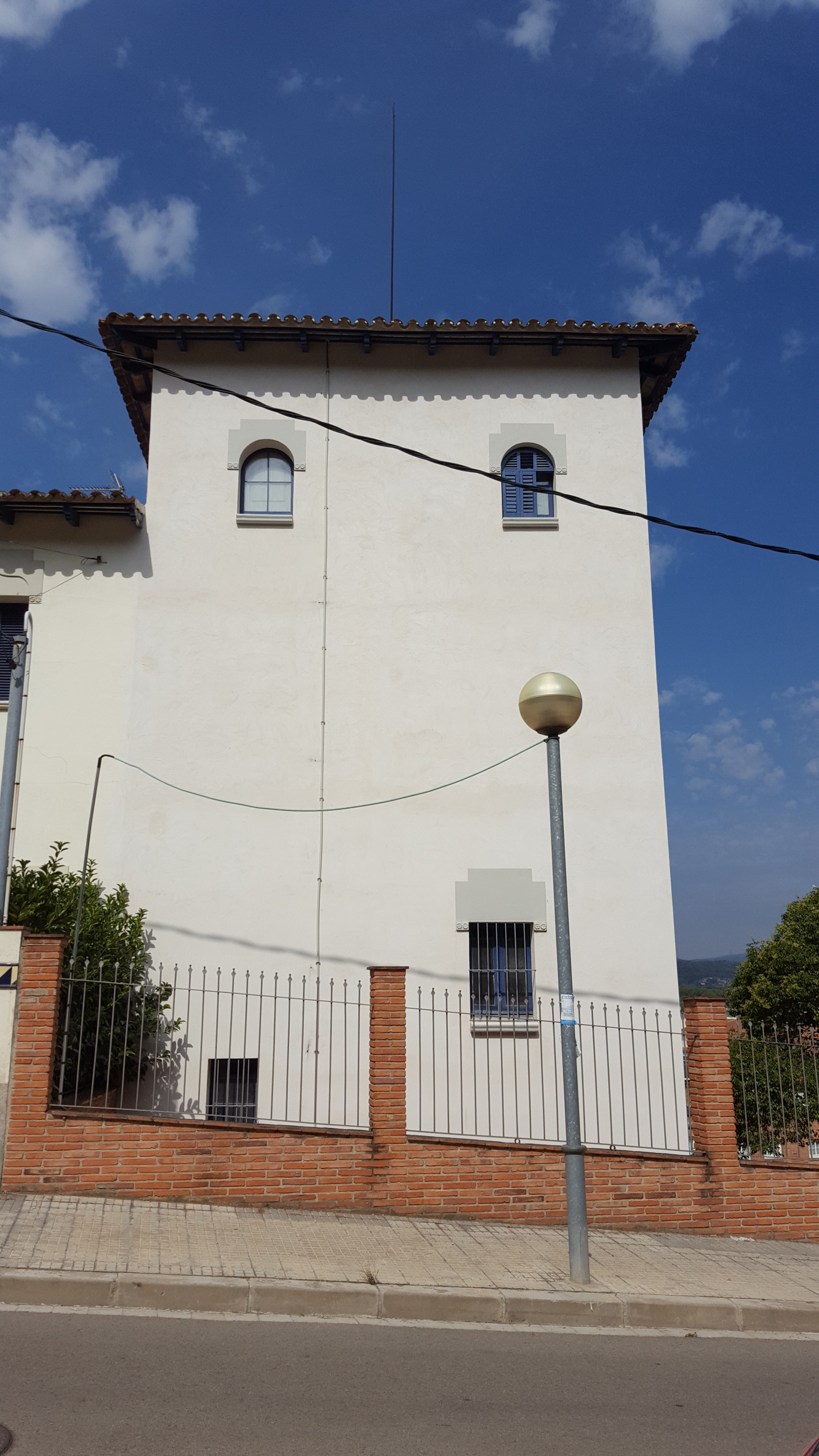 Torre de la casa Folch